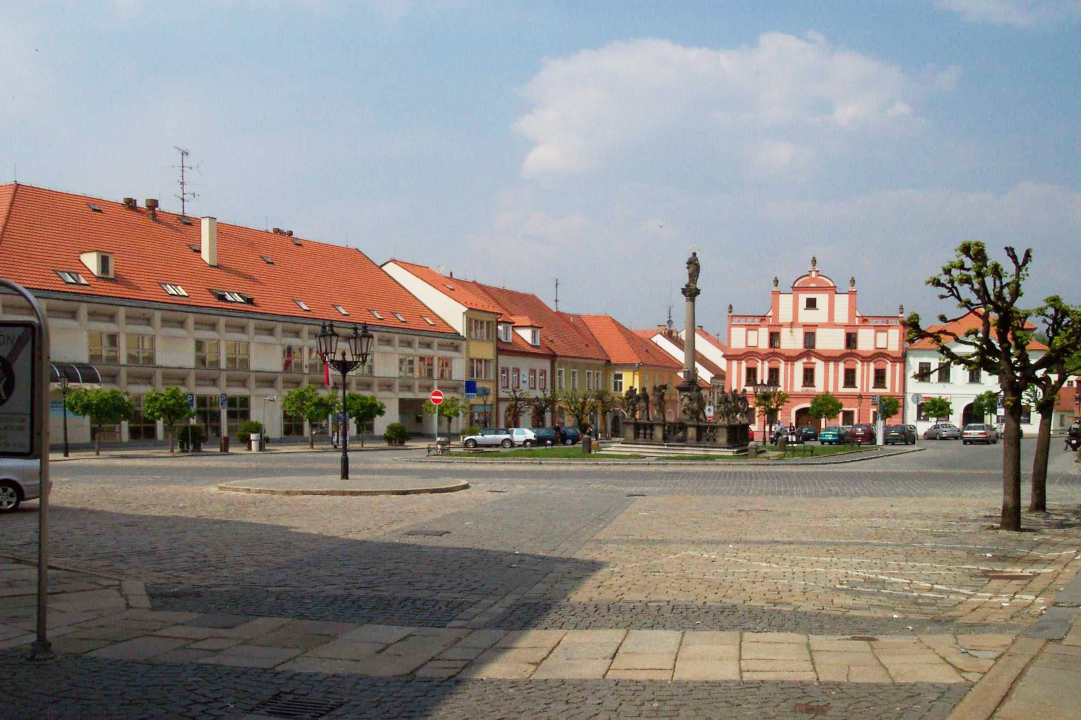 Alšovo náměstí, Písek, CZ